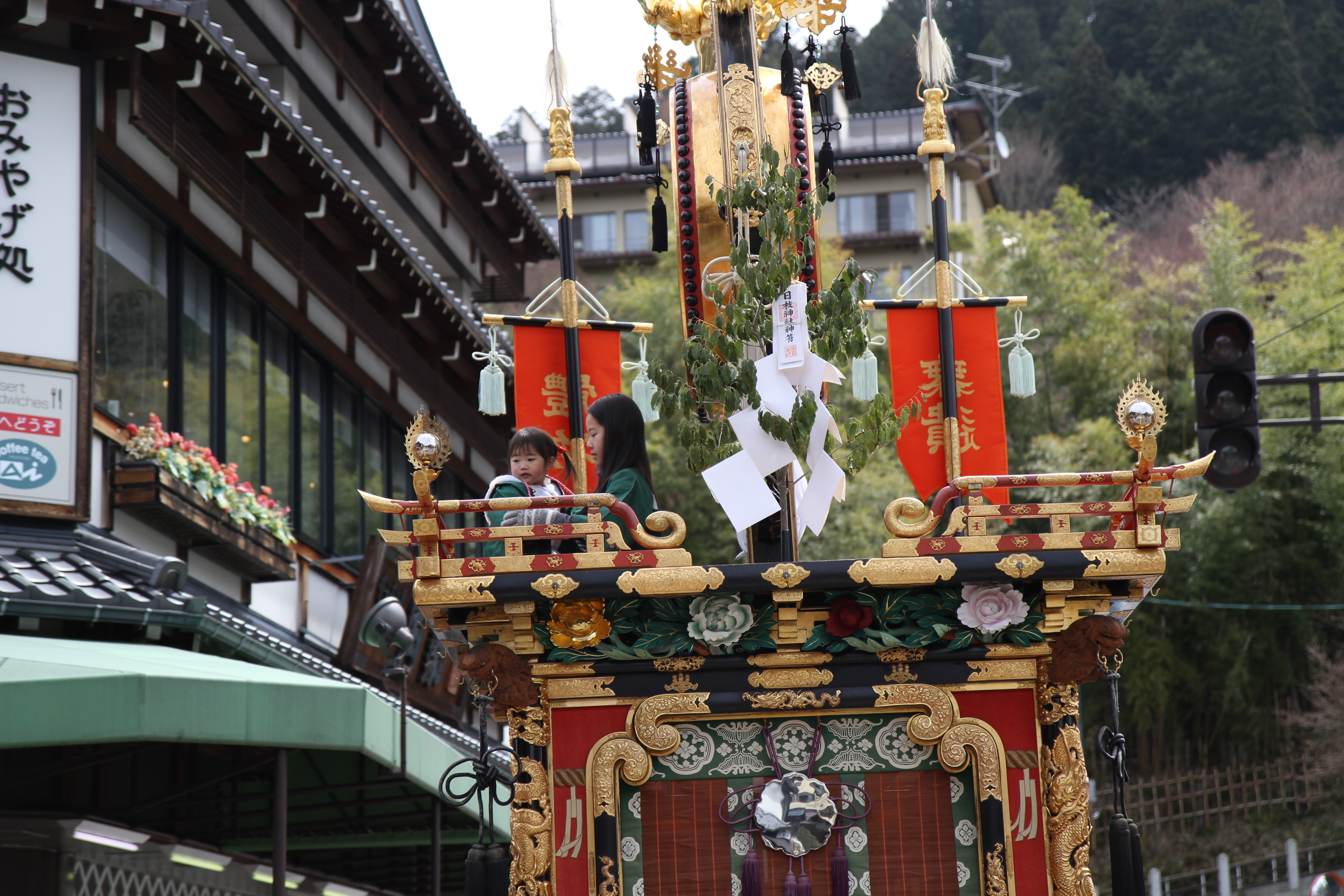 神楽台 (岐阜県高山市)